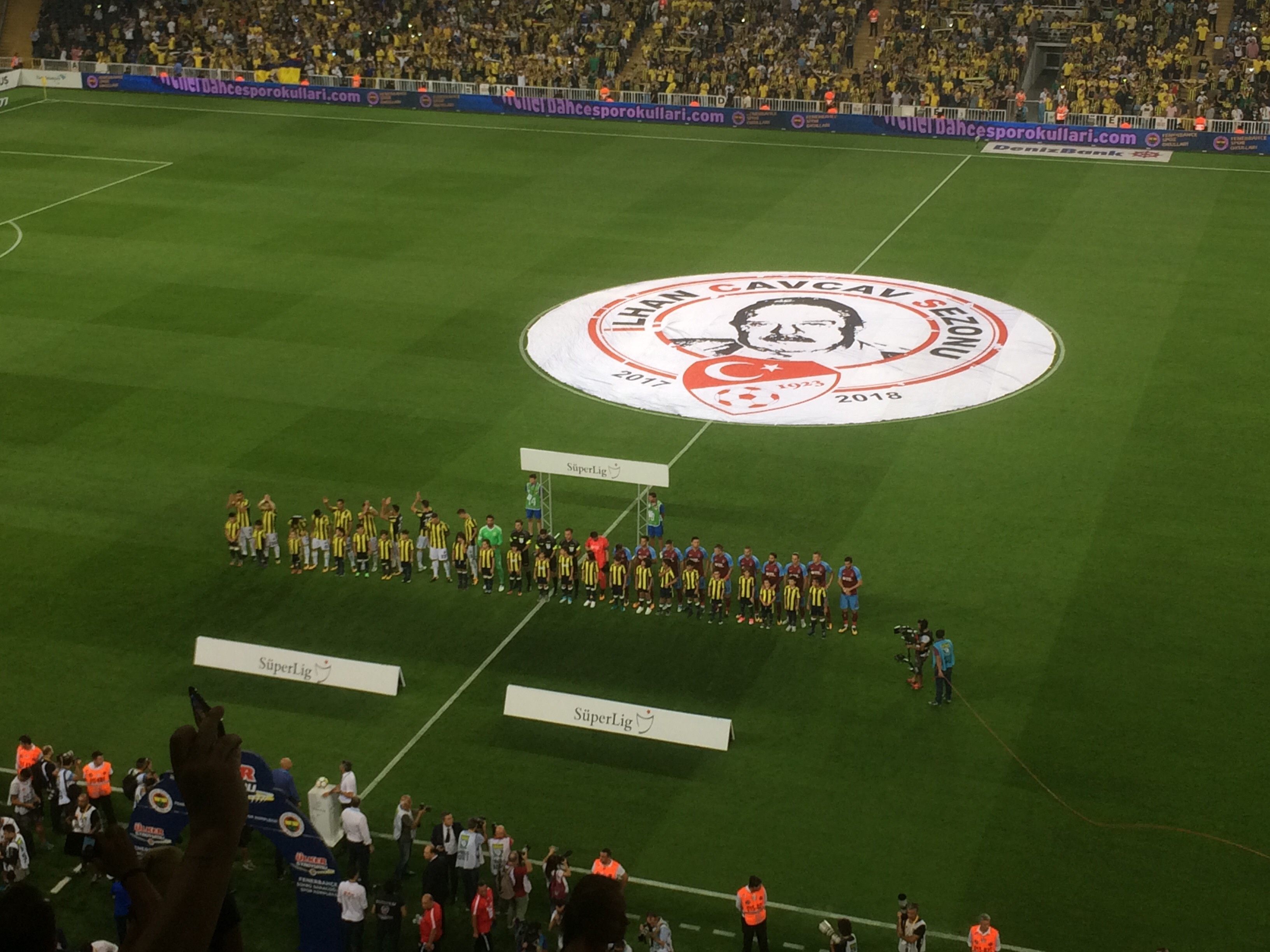 Fenerbahçe SK vs Trabzonspor 20 Aug 2017